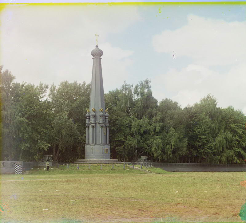 Smolensk Смоленск. Памятник героям 1812 года